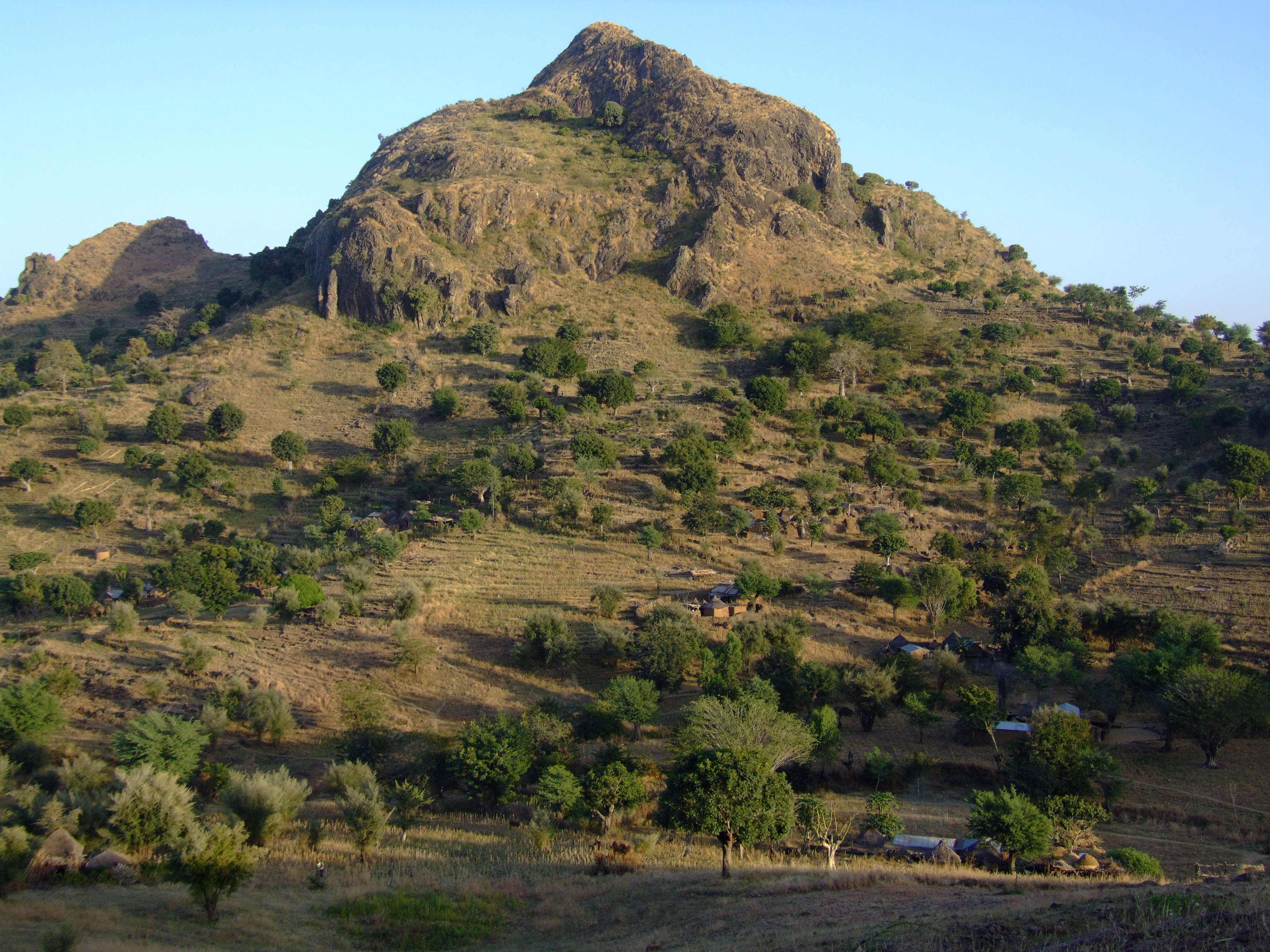 Mandara Mountains